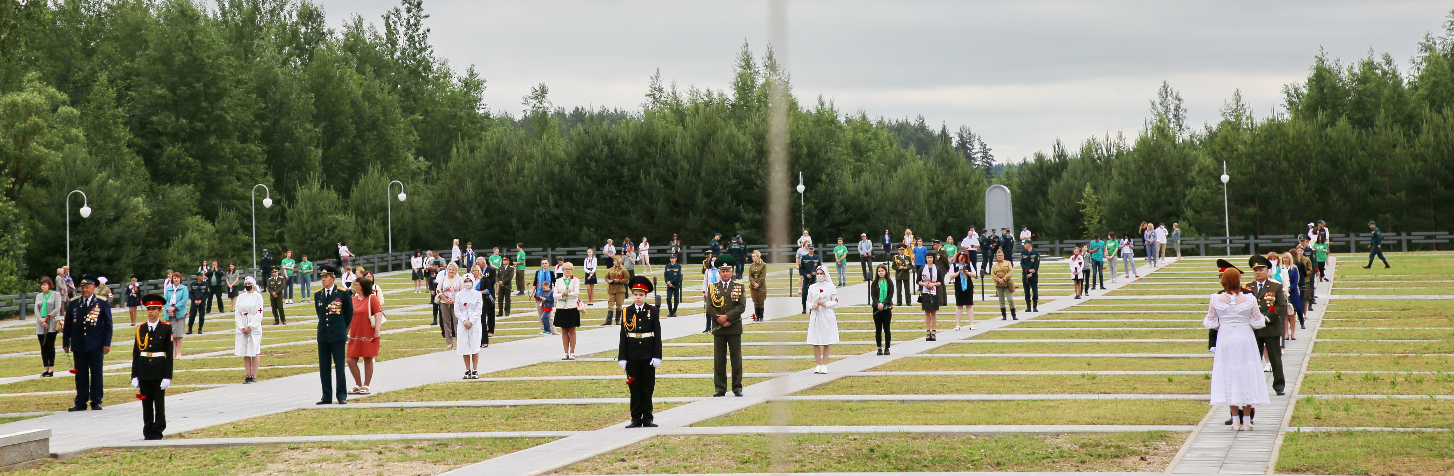 Урочище Пески